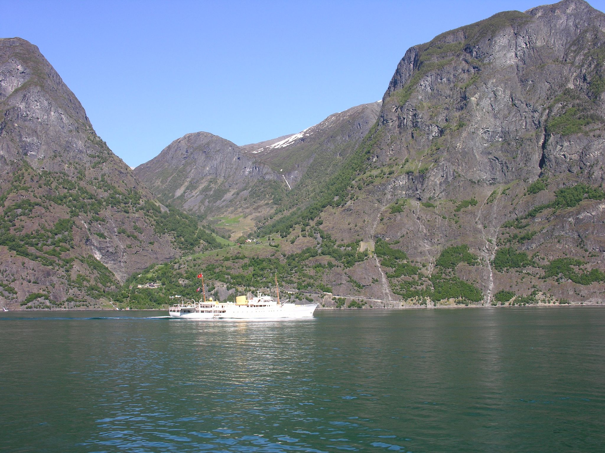 Kongeskipet Norge ved Skjerdal i Aurlandsfjorden. Vegen ein ser er Fylkesveg 242 i Sogn og Fjordane.